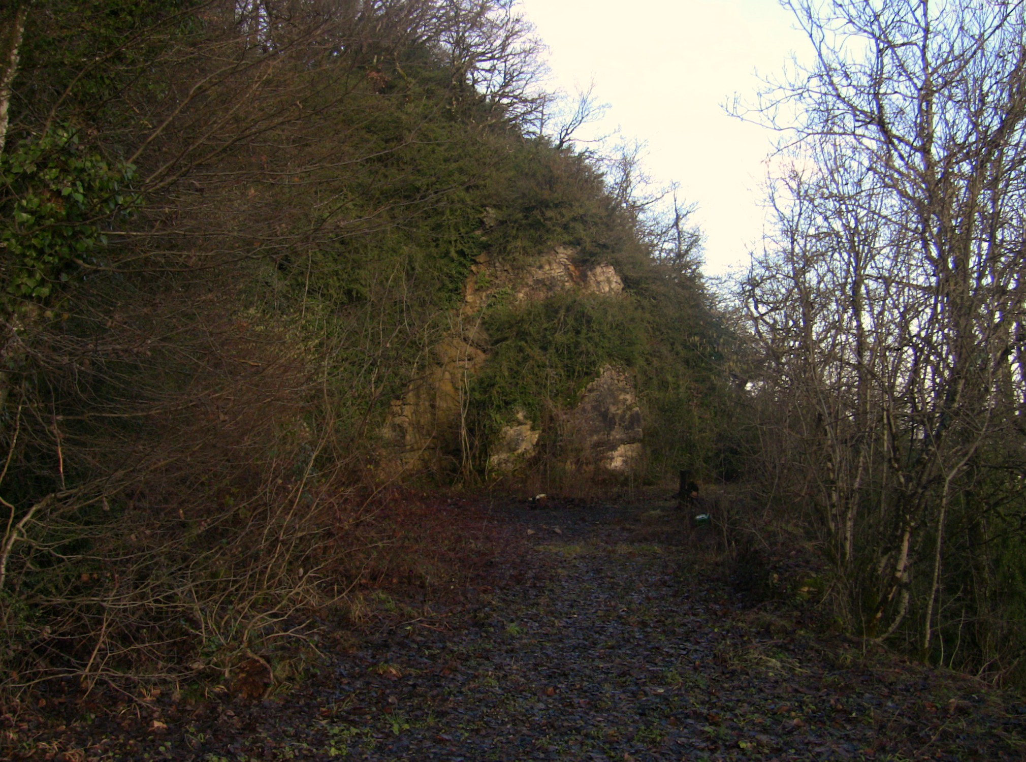 Vue générale du magasin annexe du fort de Planoise, à Besançon (Doubs, France).